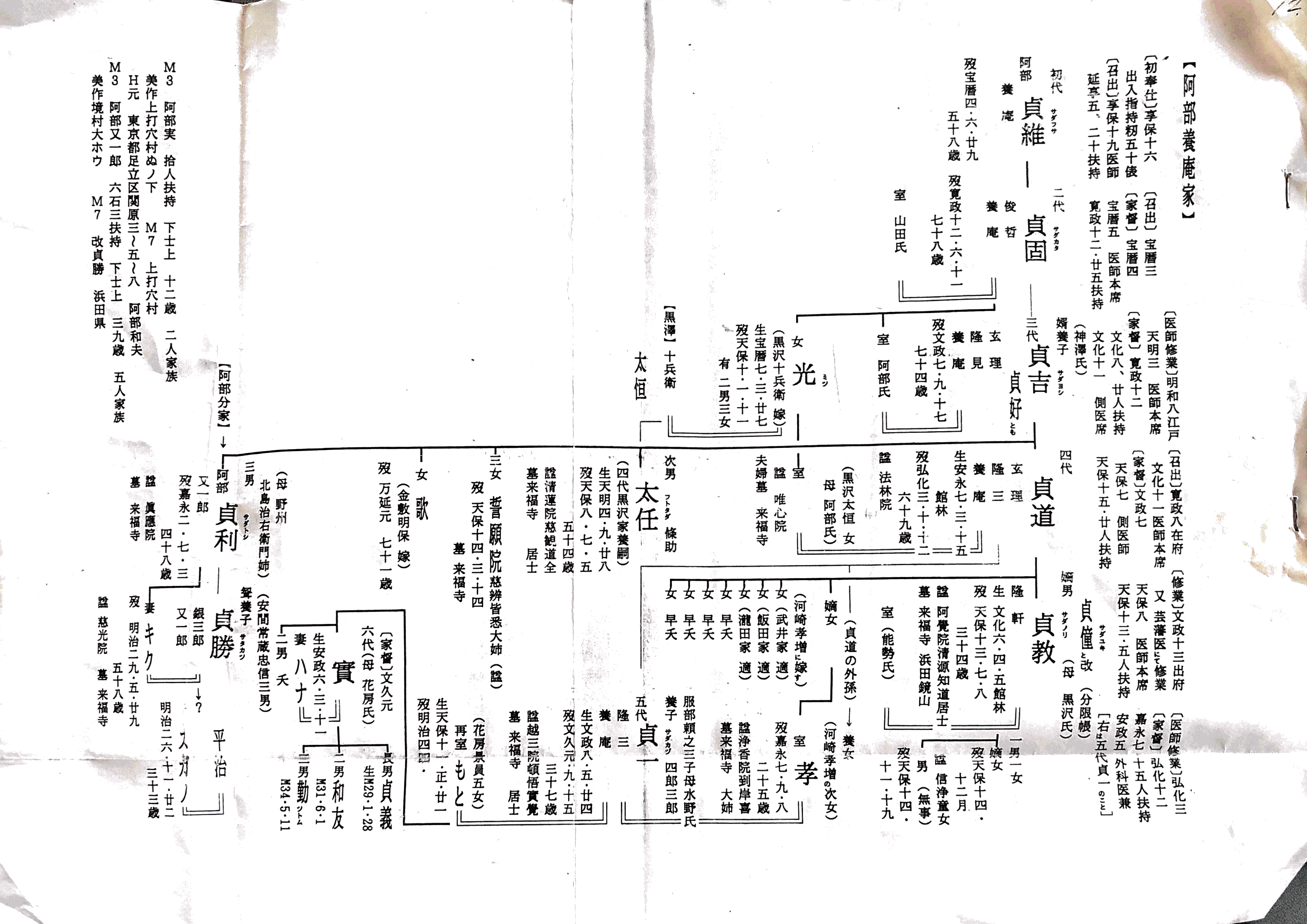 代々御典医として使えた,阿部家の家系図. 以下阿部養庵の略歴. 1734年（享保19年）: 二十人扶持で越智松平家に召抱えとなる. 1755年（宝暦5年）: 阿部養庵貞固が医師本席を任命され、以後代々御典医となる. 1855年（安政2年）: 阿部養庵貞一が福沢諭吉らとともに適塾に入門し蘭学を学ぶ.